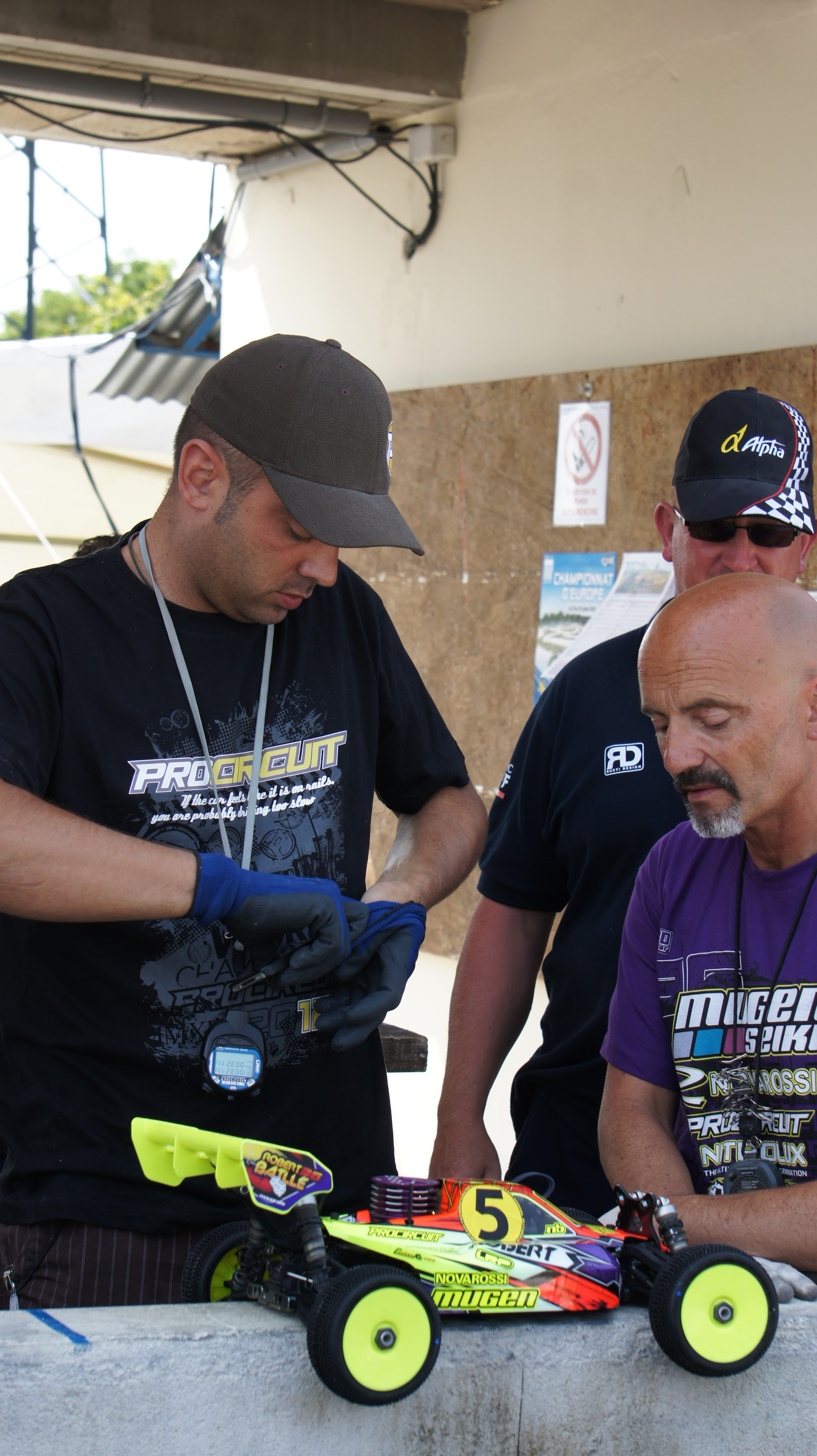 Techniciens .